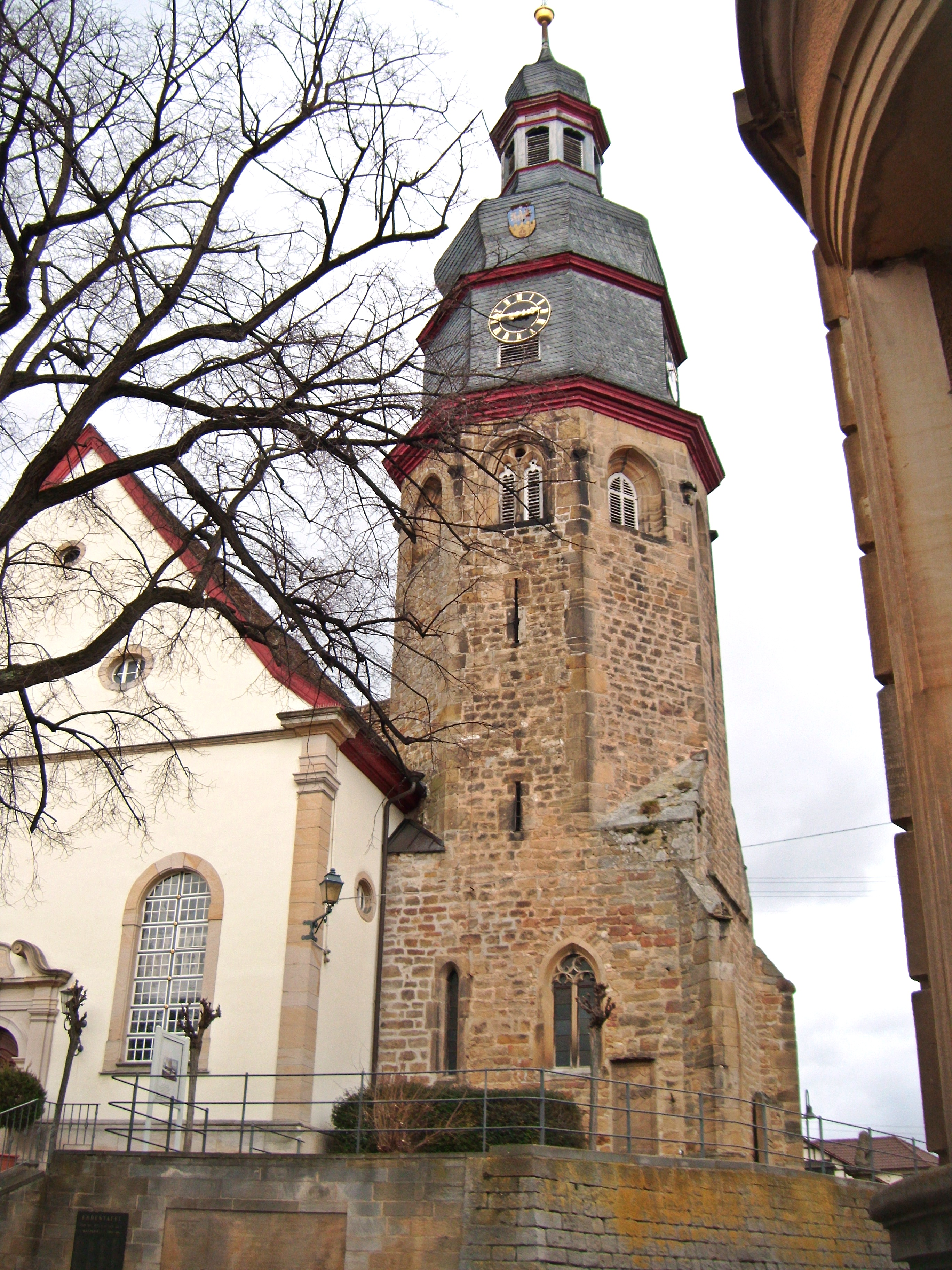 Protestantische Salvatorkirche Kallstadt, Rheinland-Pfalz